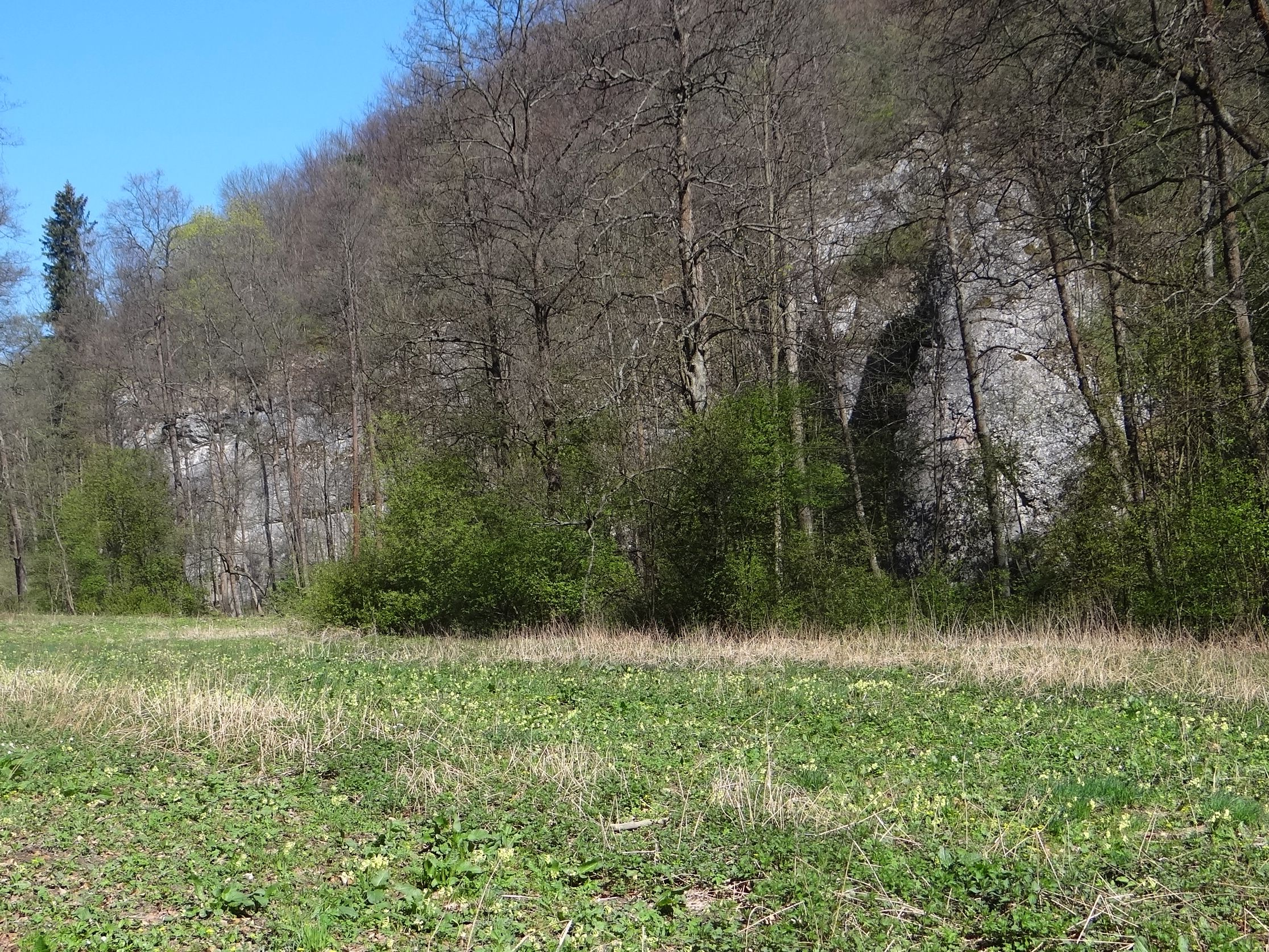 Skały Framugi w Dolinie Sąspowskiej